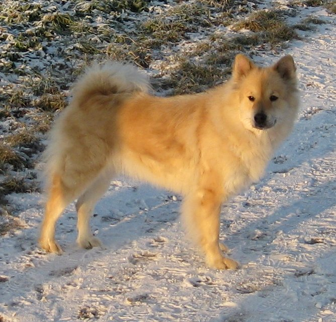 Own work